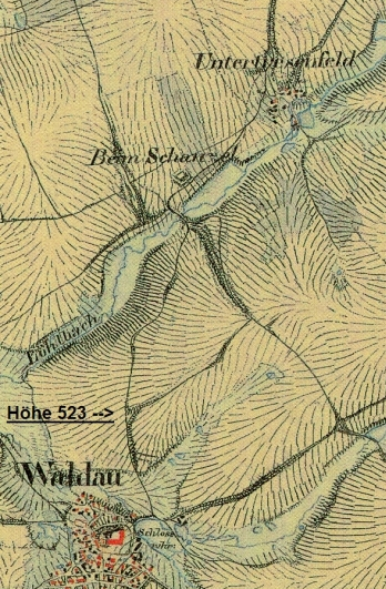 Ausschnitt aus Historischer Karte Bayern (Pleystein)